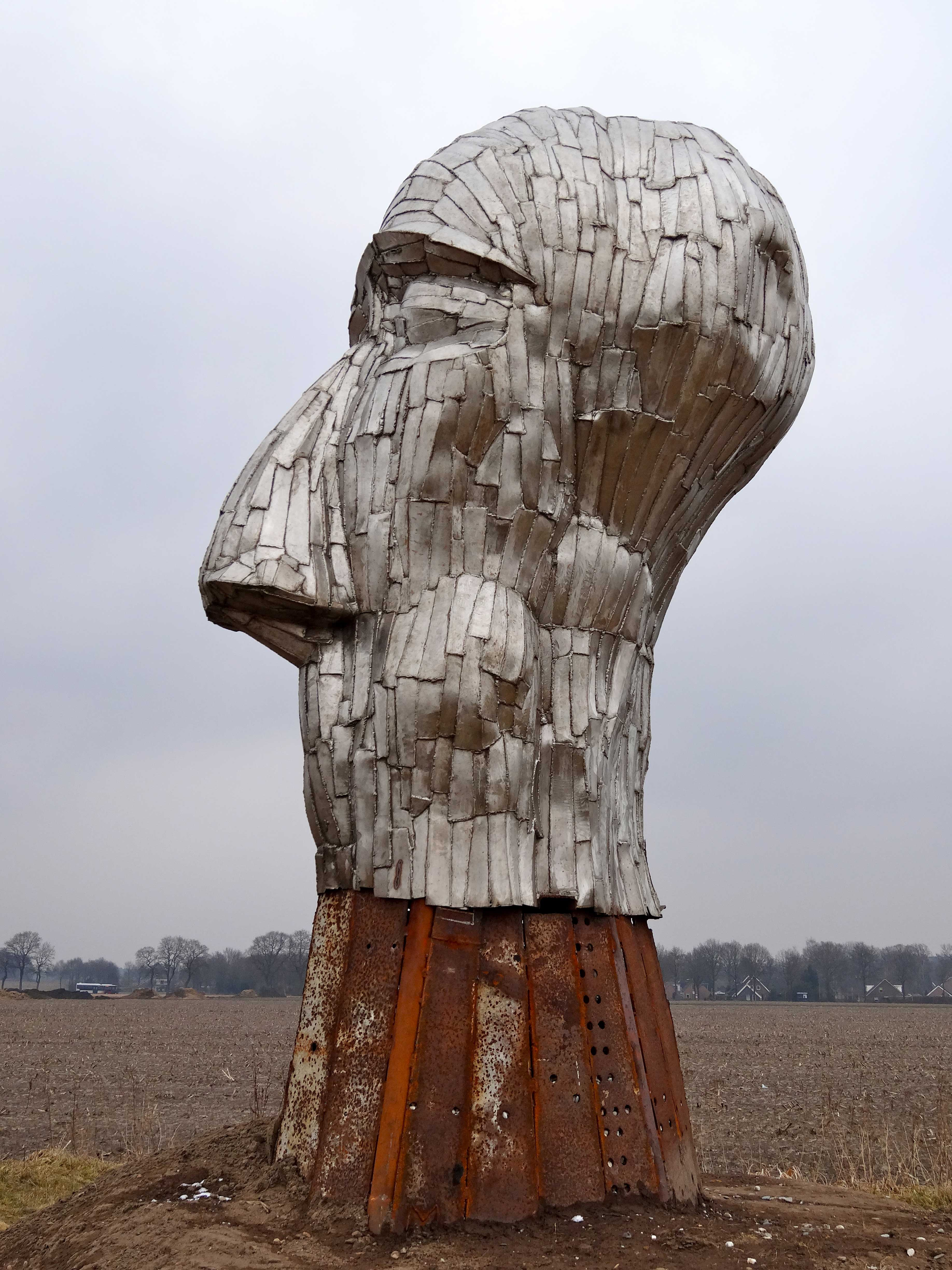 "Kop van de Hondsrug", gemaakt door Willem Kind, langs de N34 tussen Borger en Drouwen